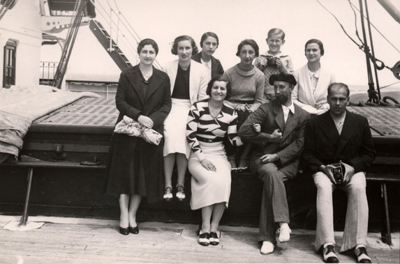 Jenaro Prieto(de boina negra) autor de la novela El socio.